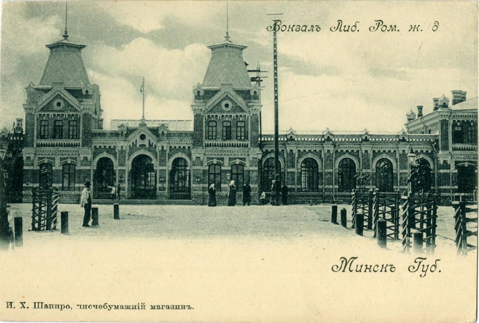 Беларуская (тарашкевіца): Менск (Miensk), Віленскі (Vilenski) вакзал